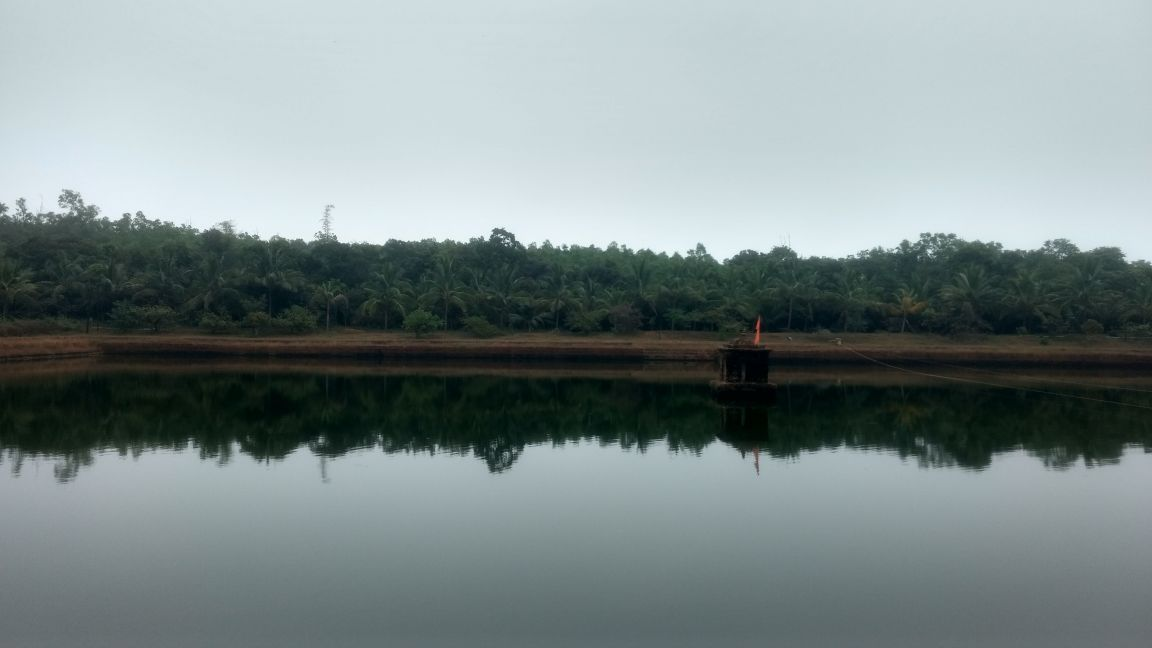 ಕನ್ನಡ: ಶ್ರೀ ಚಕ್ರತೀರ್ಥ ಕೆರೆ, ಮಂಜುಗುಣಿ